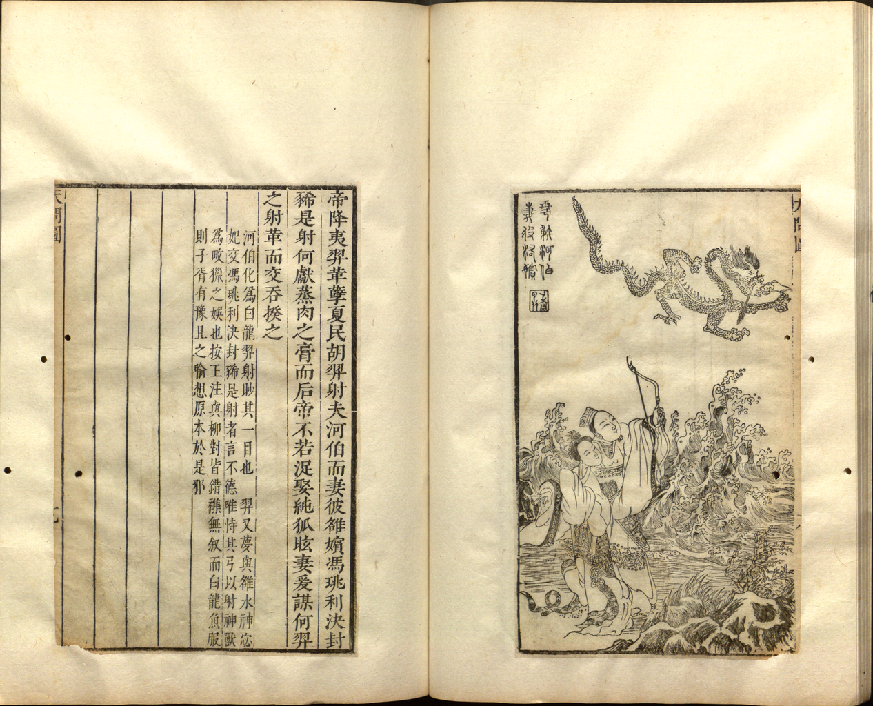 Yi l'archer, après avoir séduit la femme du Comte du Fleuve (He bo), décoche une flèche dans l'oeil du mari sous la forme d'un dragon. Li sao de Qu Yuan, illustré par Xiao Yuncong (1596-1673), gravé par Tang Yongxian.